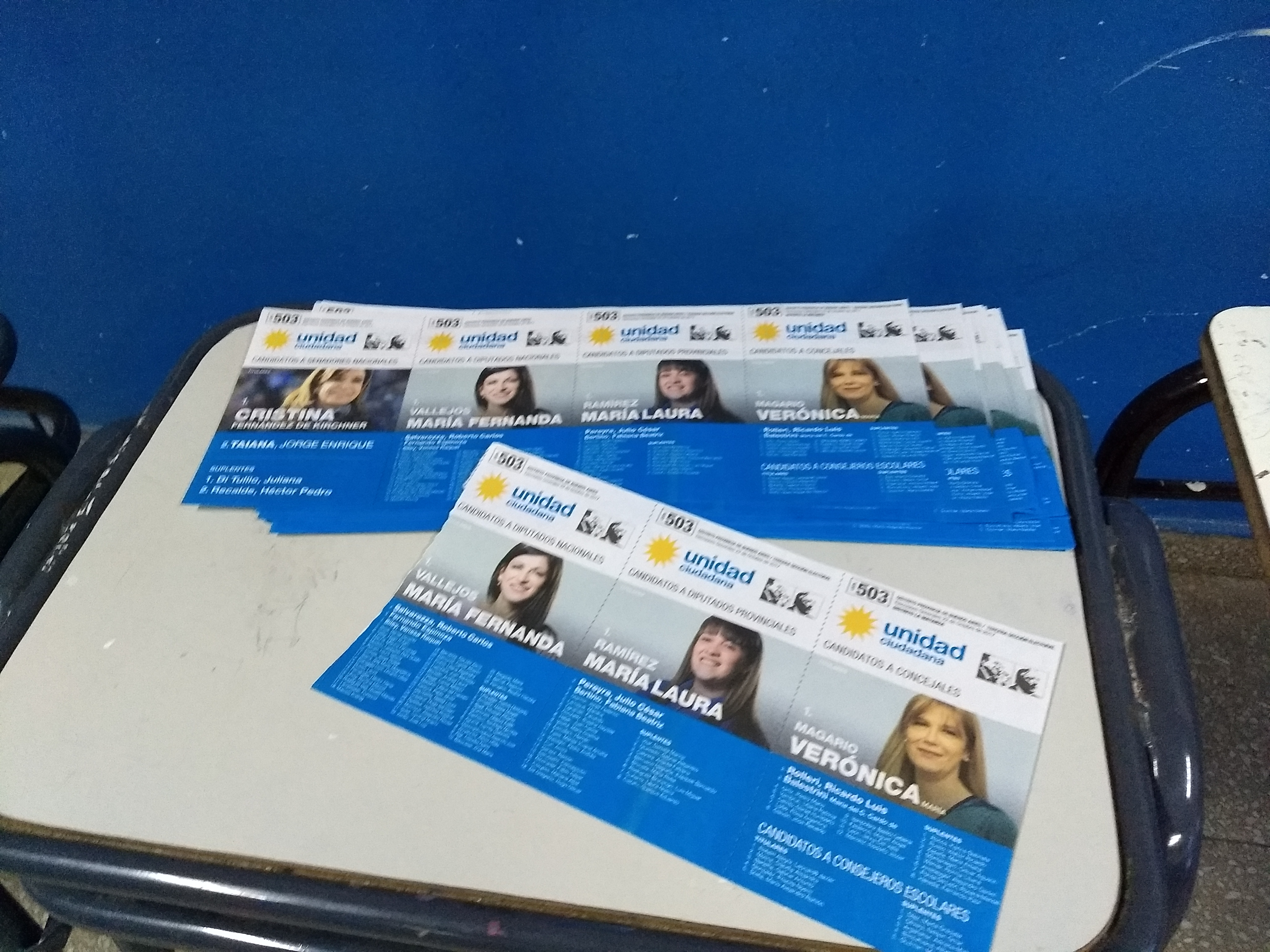 Boletas de Unidad Ciudadana, en un cuarto oscuro de la escuela primaria n°184, Rafael Castillo, partido de La Matanza, provincia de Buenos Aires, el día de las elecciones legislativas generales del 22 de octubre de 2017.